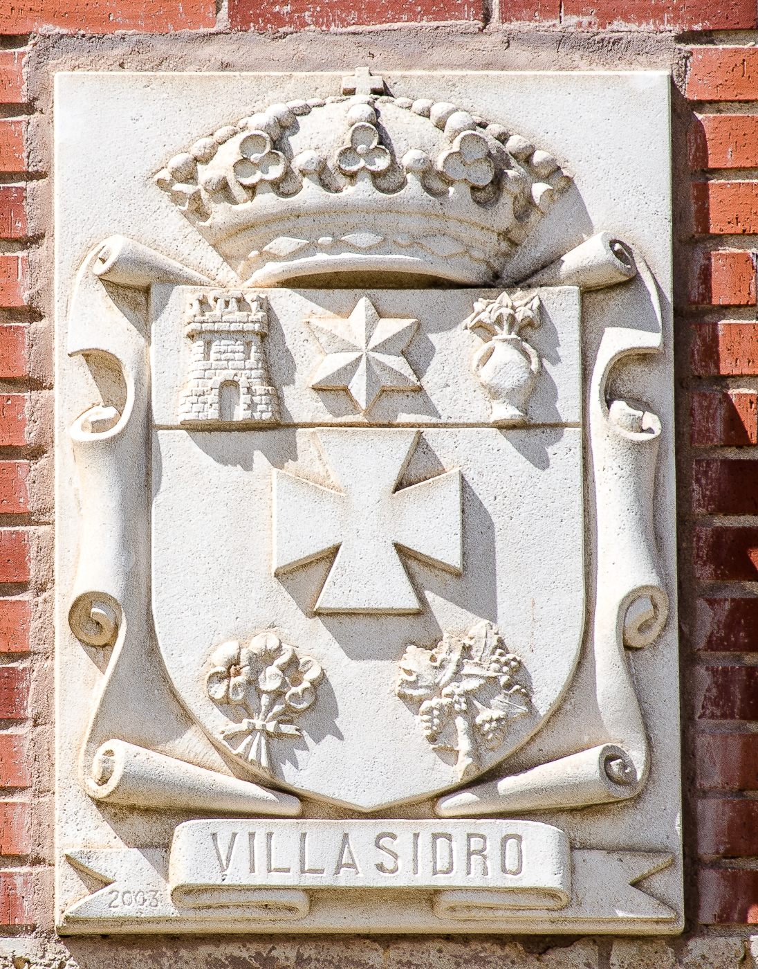 Escudo de Villasidro (Burgos). Puesto en la fachada de la casa de juntas local.